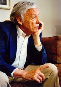 Porträt von Heinz Berggruen